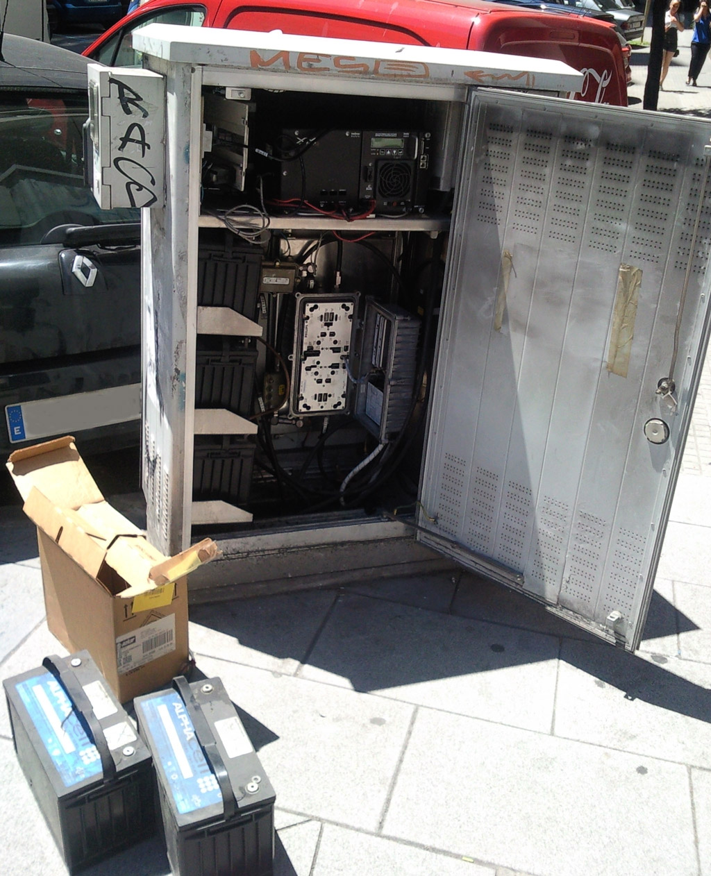 Armario dun nodo secundario de cable R na rúa Juan Flórez da Coruña. En primeiro termo as baterías, (á dereita) o nodo óptico aberto, a caixa negra superior equipamento para pares telefónicos.